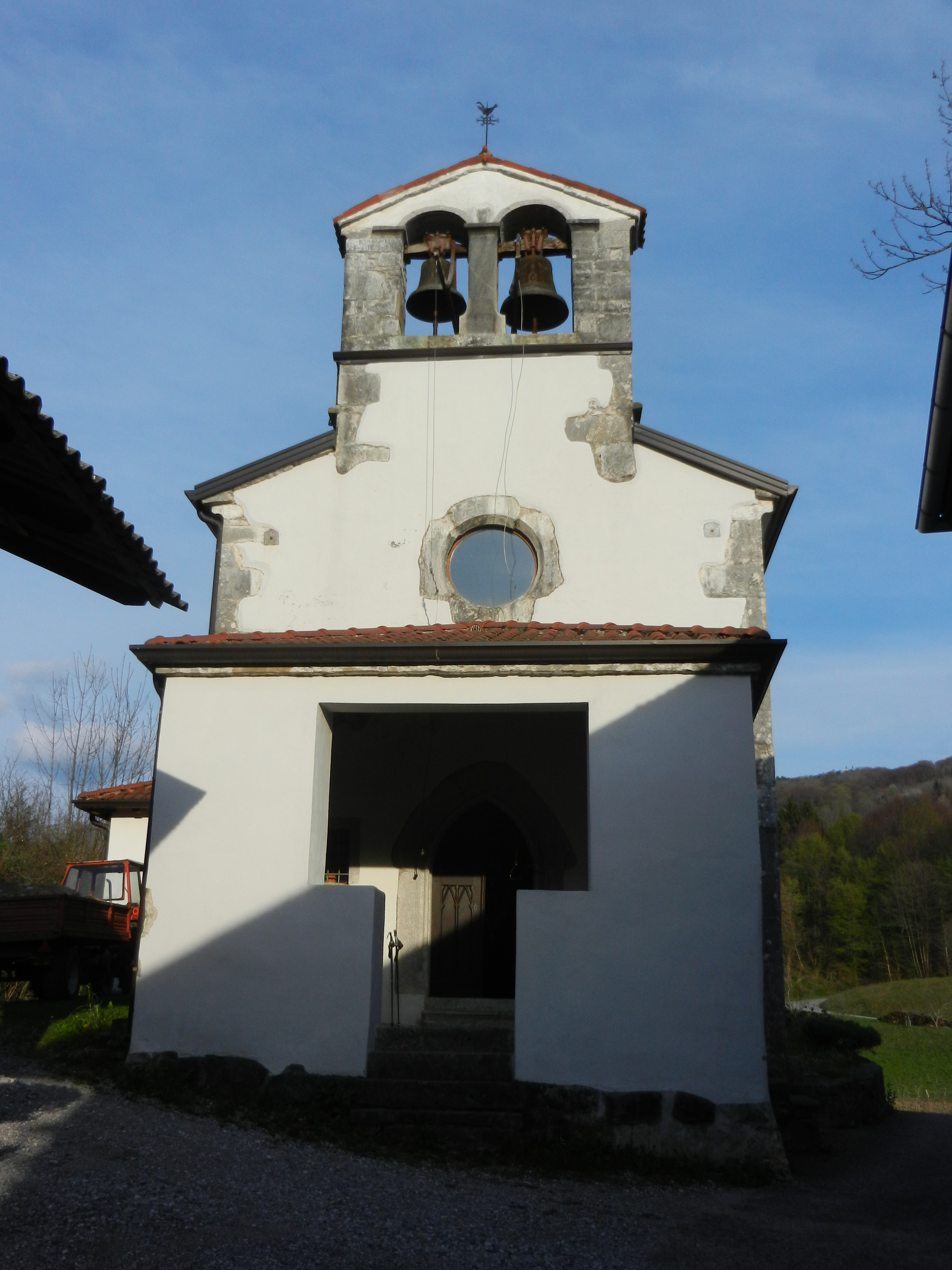 Cerkev sv. Kancijana, Britof, Ukanje.